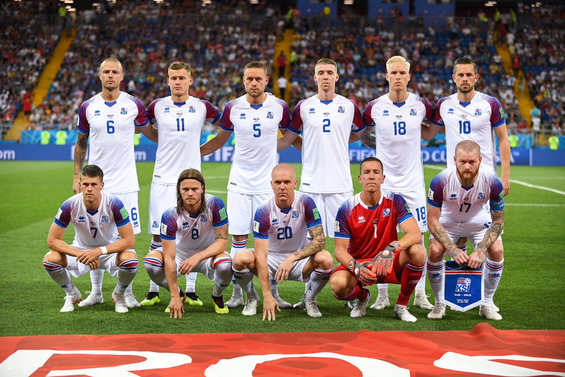 Сборная Исландии уступает Хорватии и покидает ЧМ-2018